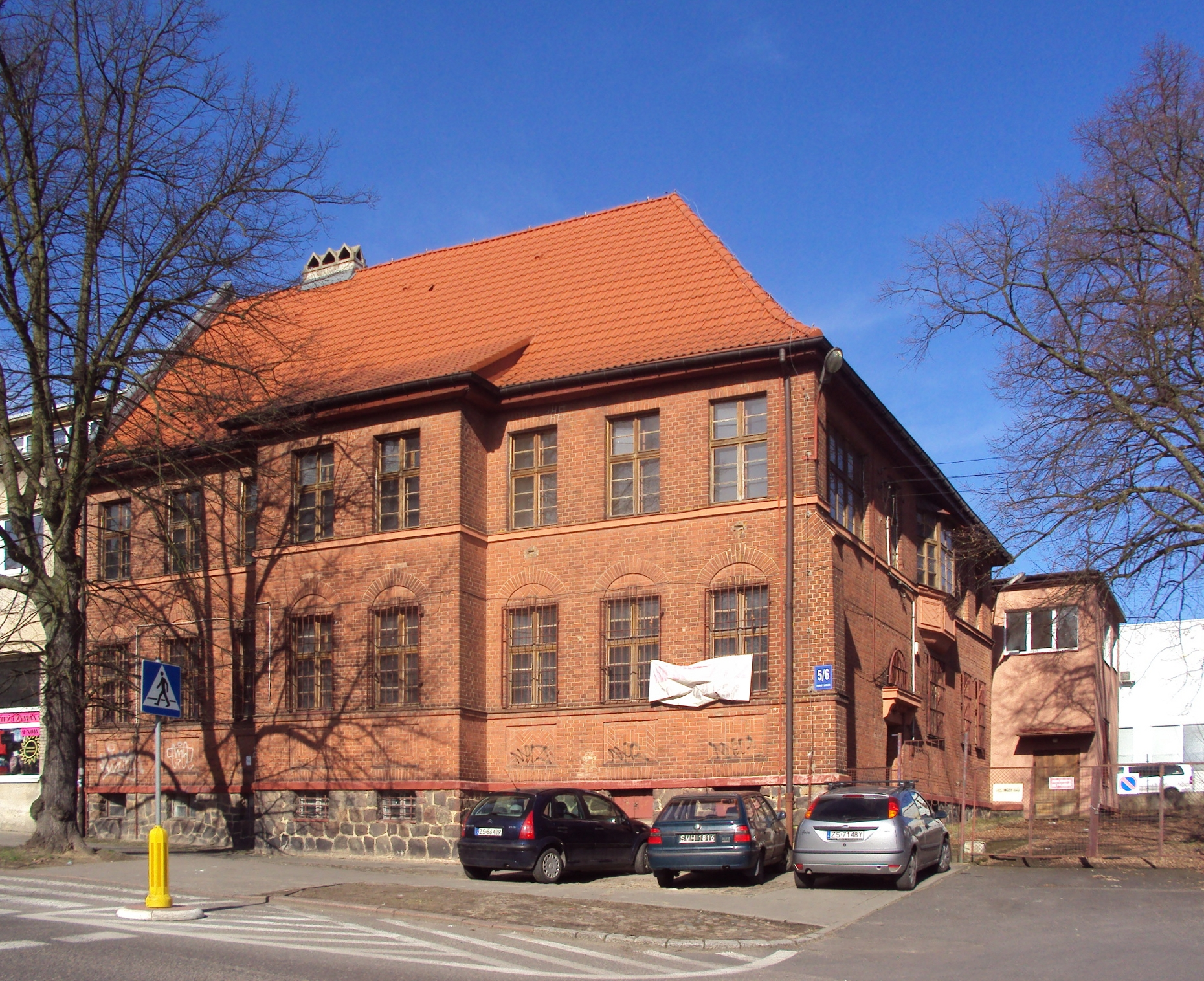 Dawny budynek parafii nieistniejącego Kościoła Lutra (Lutherkirche) przy ul. Robotniczej 5/6 w Szczecinie